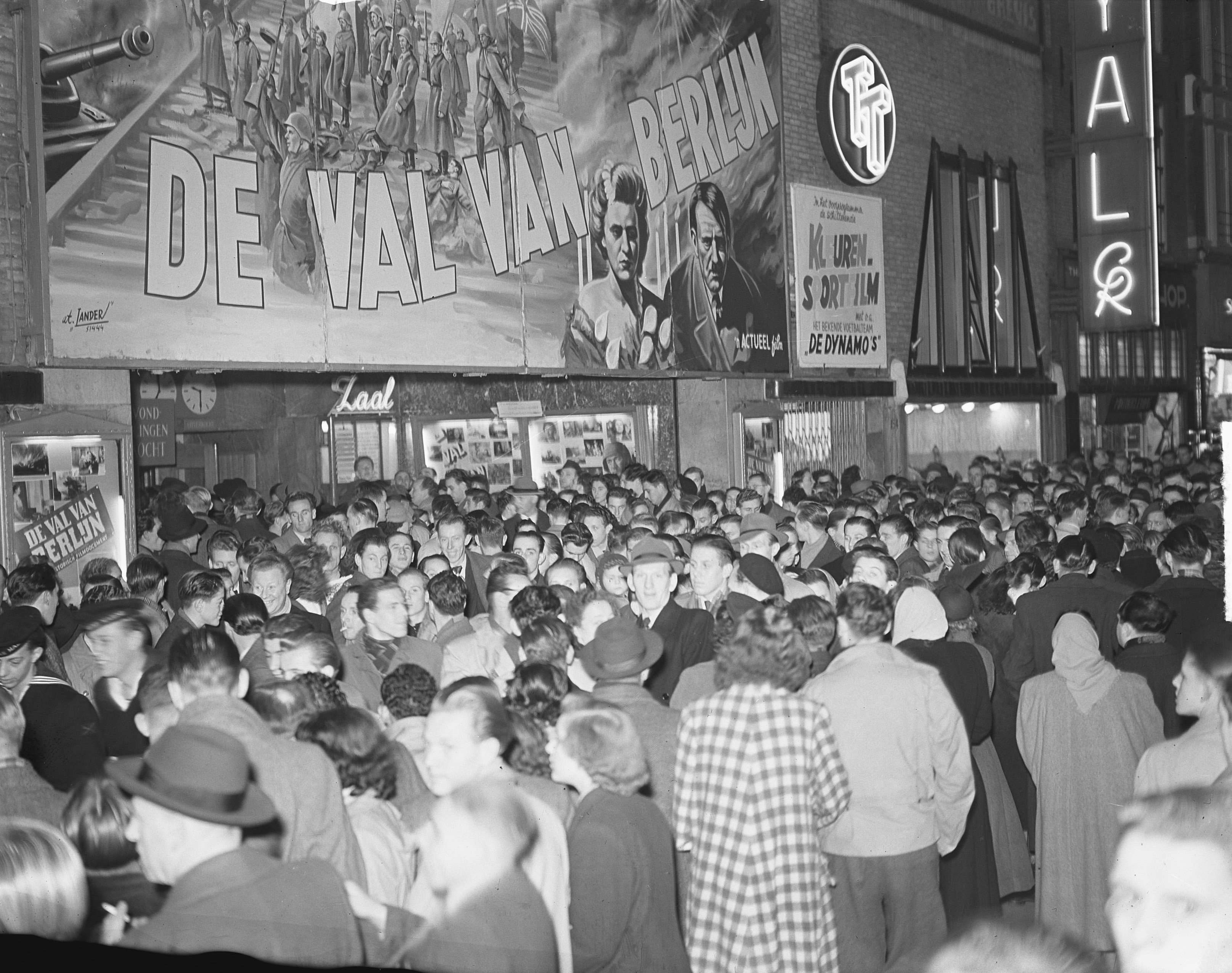 Collectie / Archief : Fotocollectie Anefo Reportage / Serie : [ onbekend ] Beschrijving : Film "De Val van Berlijn" in bioscoop Royal te Amsterdam [betreft Russische film "Padeniye Berlina"] Datum : 8 december 1950 Locatie : Amsterdam, Noord-Holland Trefwoorden : bioscopen, films, publiek, reclame Persoonsnaam : Royal Fotograaf : Bilsen, Joop van / Anefo Auteursrechthebbende : Nationaal Archief Materiaalsoort : Glasnegatief Nummer archiefinventaris : bekijk toegang 2.24.01.09 Bestanddeelnummer : 904-3436